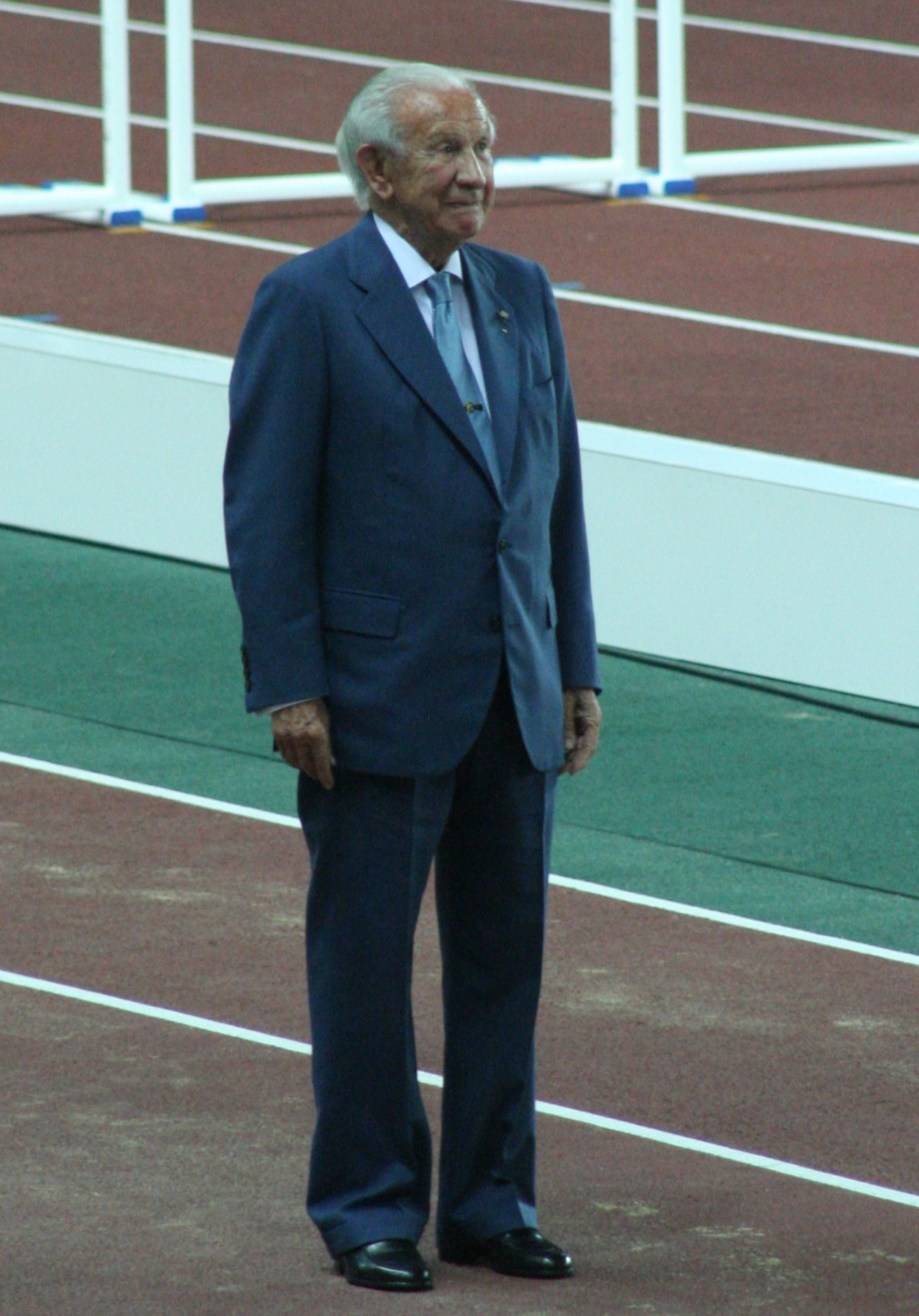 World Athletics Championships 2007 in Osaka - former IOC president Juan Antonio Samaranch, assisting a victory ceremony.